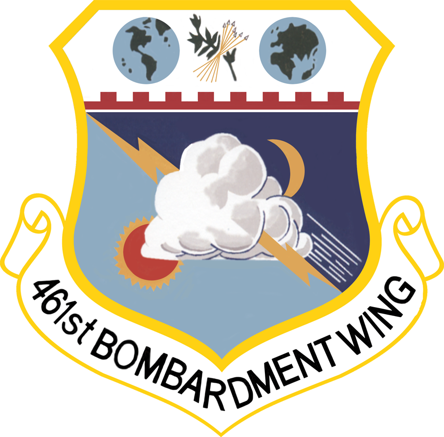 461st Bombardment Wing